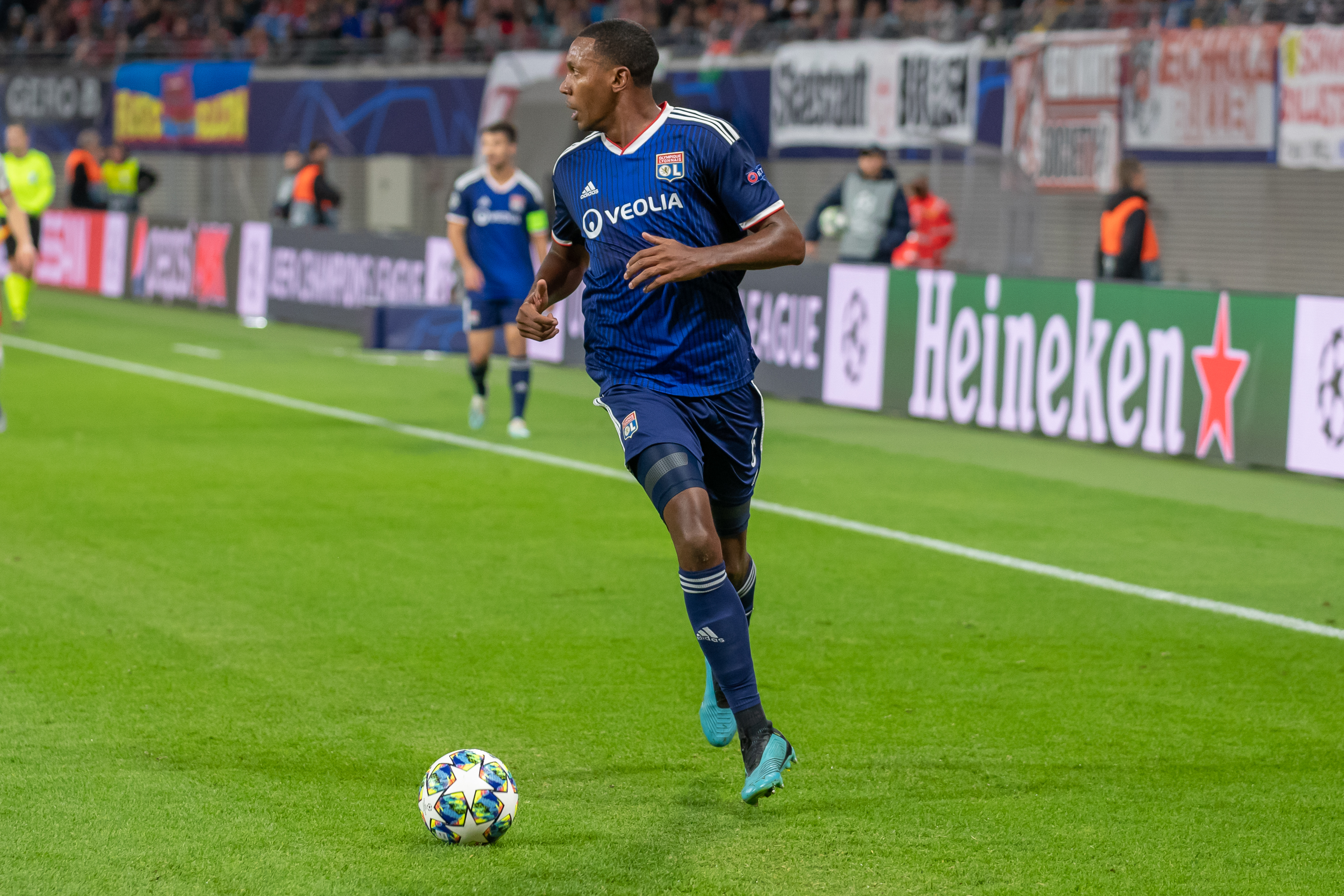 Fußball, Männer, UEFA Champions League, RB Leipzig - Olympique Lyonnais; Marcelo (Olympique Lyonnais, 6); Freisteller, Einzelbild, Aktion, action